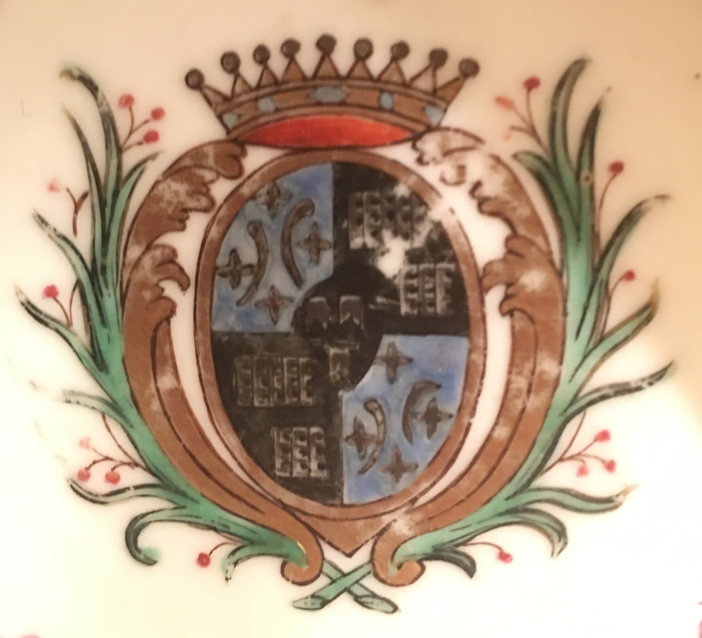 Peinture chinoise sur porcelaine du XVIIIéme siècle représentant les armoiries de la maison de Lavaulx